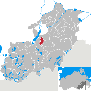 Holldorf in Mecklenburg-Vorpommern, Landkreis Mecklenburg-Strelitz